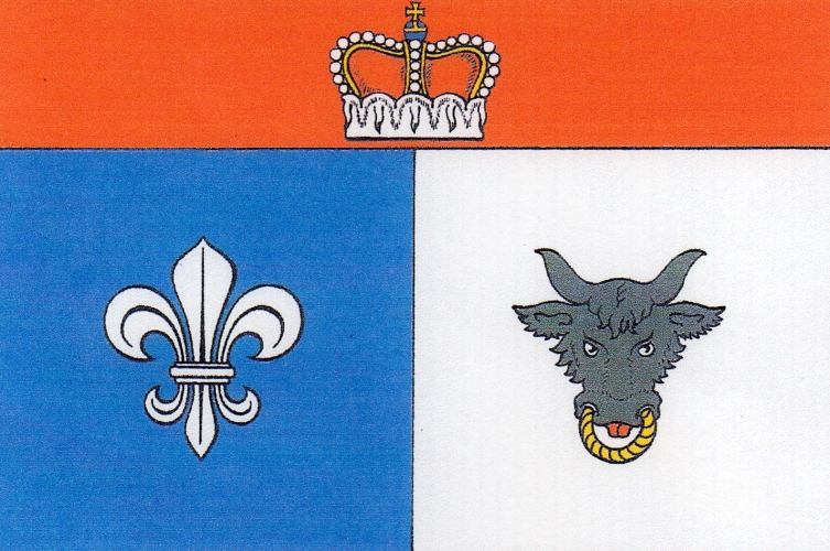 vlajka, Velké Janovice, okres Žďár nad Sázavou